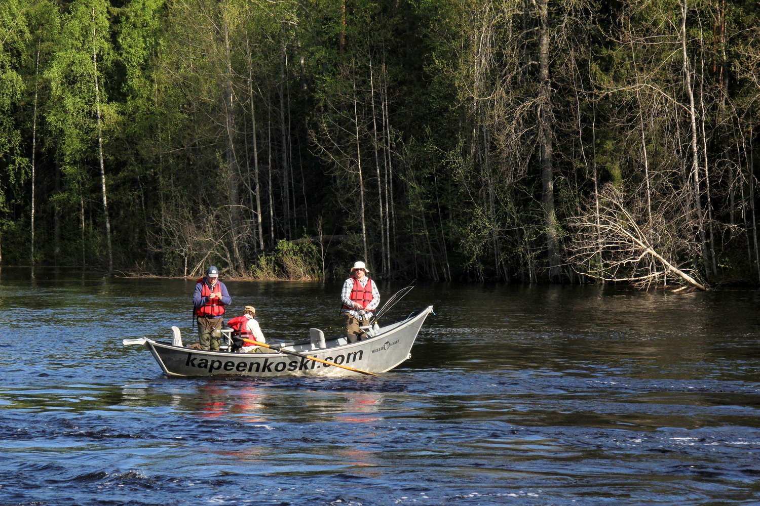 Kalastusta Drift boat -koskiveneestä Kapeenkosken alueen Kärmekoskella Äänekoskella